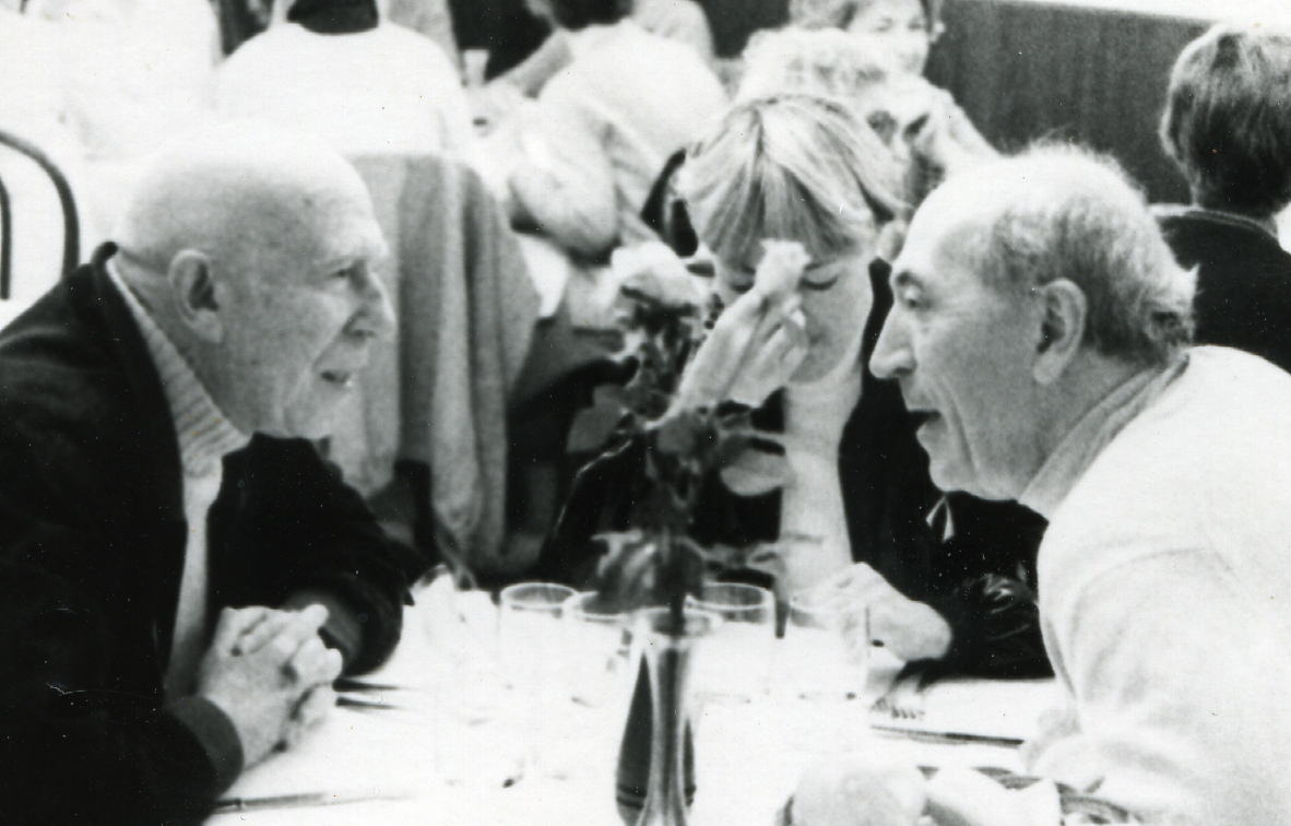 Le peintre Léon Gischia et le poète Jean Lescure en 1978. Au centre Gilberte Le Quéré-Lescure, femme du poète.